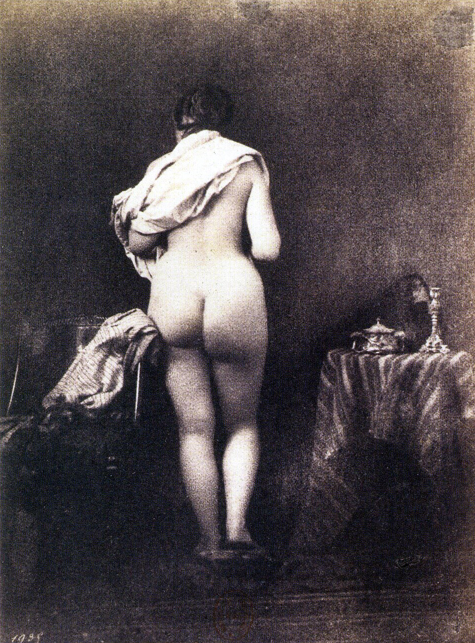 Étude d'après nature, nu n°1935, modèle pour « Les Baigneuses » Print on salted paper from a paper negative 16.5x12.3 cm Bibliothèque nationale de France, département des Estampes et de la Photographie, Eo9 t 4